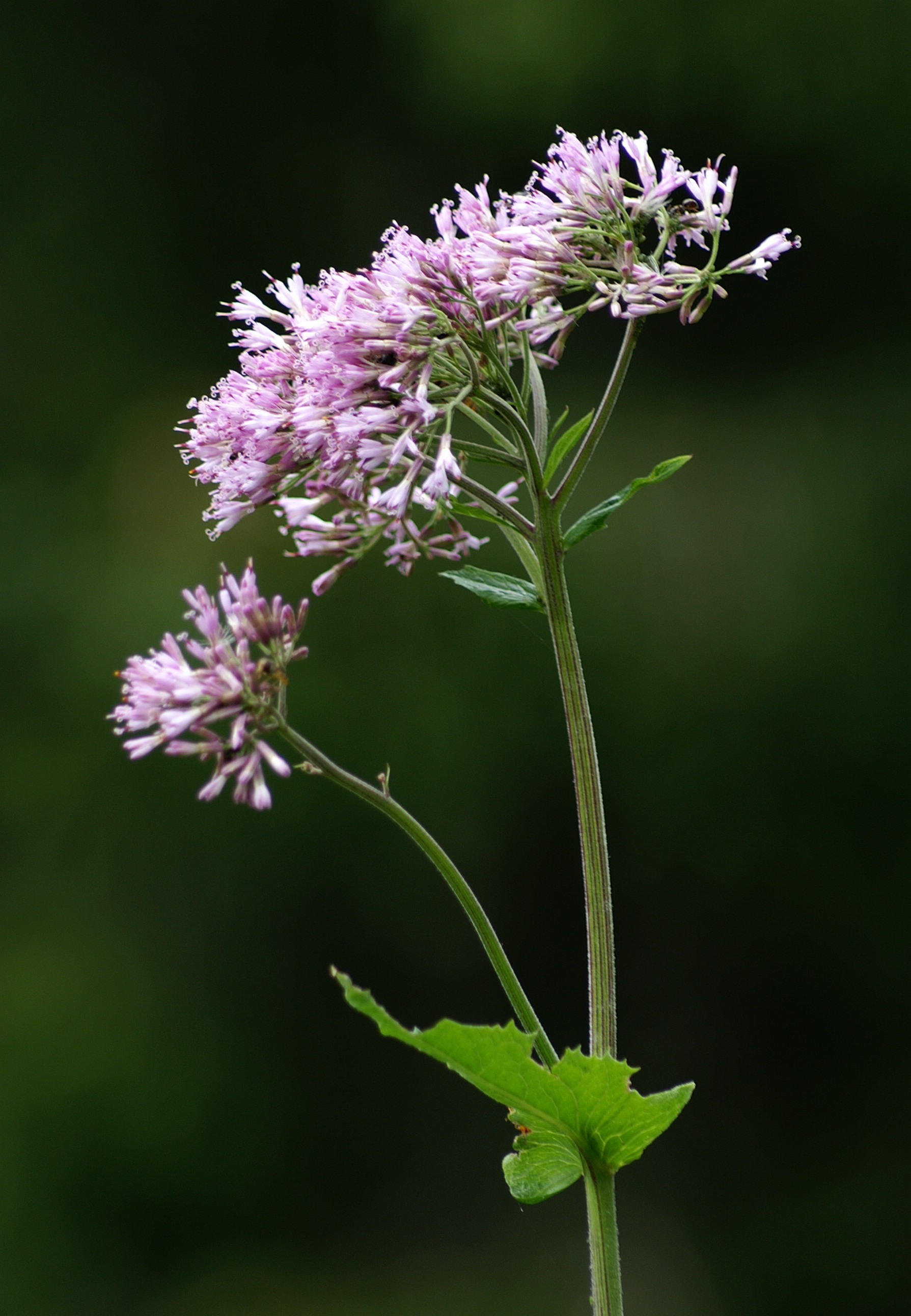 Der Graue Alpendost (Adenostyles alliariae) (Syn.: A. albifrons) ist eine Art aus der Familie der Korbblütler (Asteraceae).